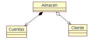 agregación